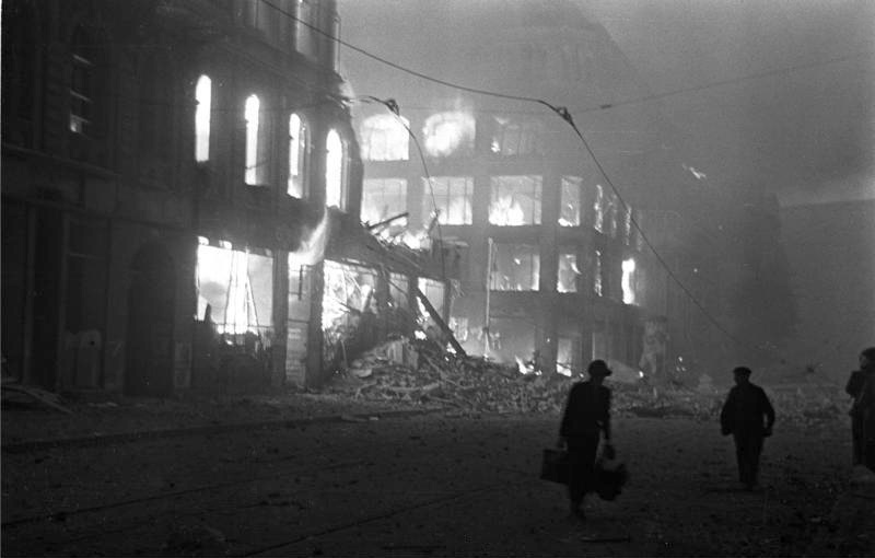 Berlin, Brände nach Luftangriff Zentralbild II. Weltkrieg 1939 - 45 Berlin, Juli 1944 Das durch einen Luftangriff zerstörte Gebäude des Scherl-Verlages in der Jerusalemer Straße Ecke Zimmerstraße